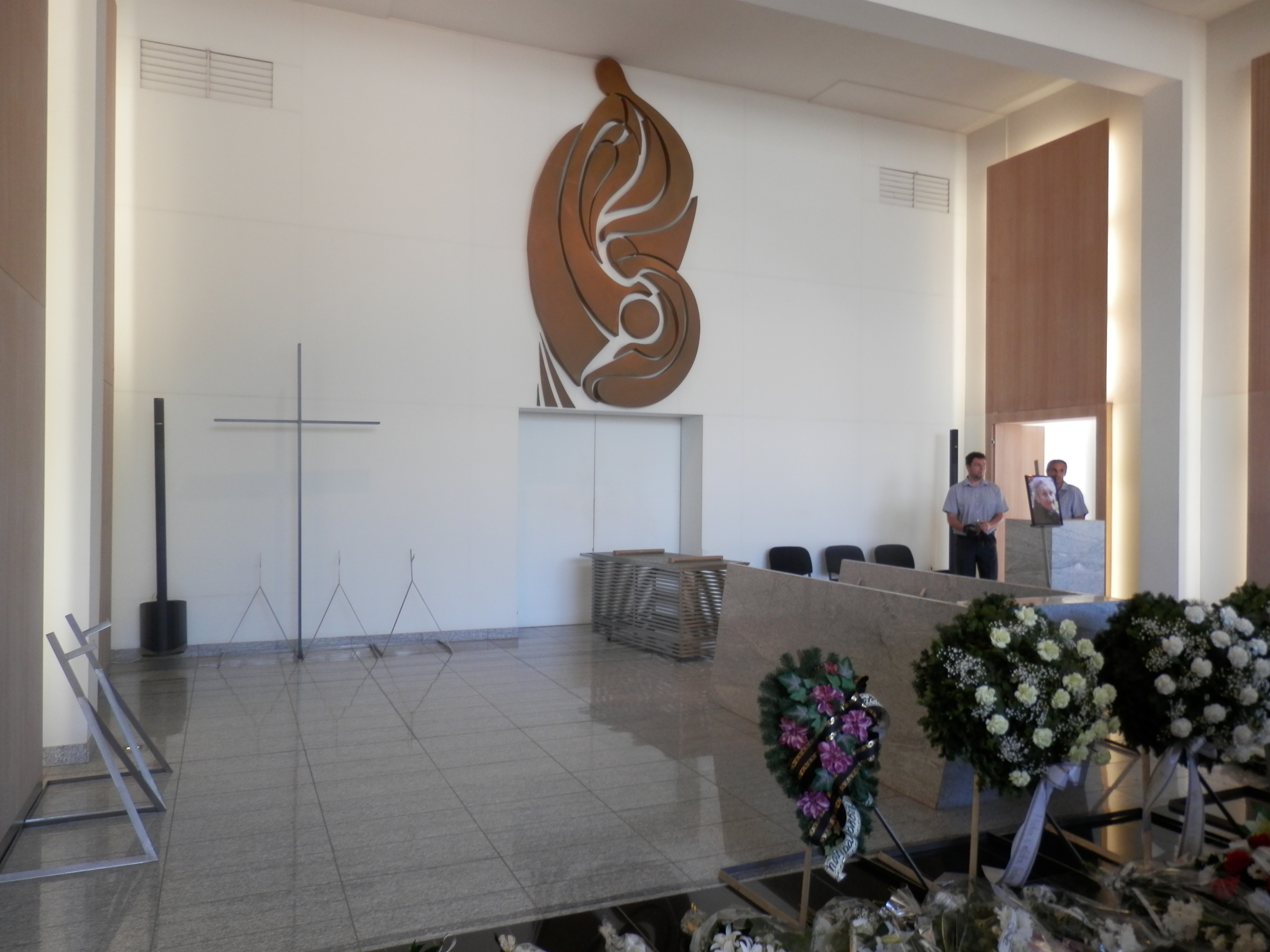 Obradná pohrebná sieň. Verejný cintorín, ulica Rastislavova číslo 83. Mesto Košice, Slovensko.